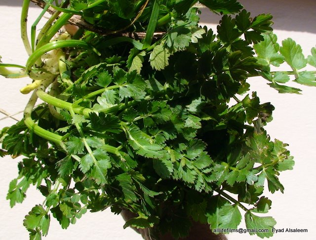 نباتات برّية سورية تؤكل